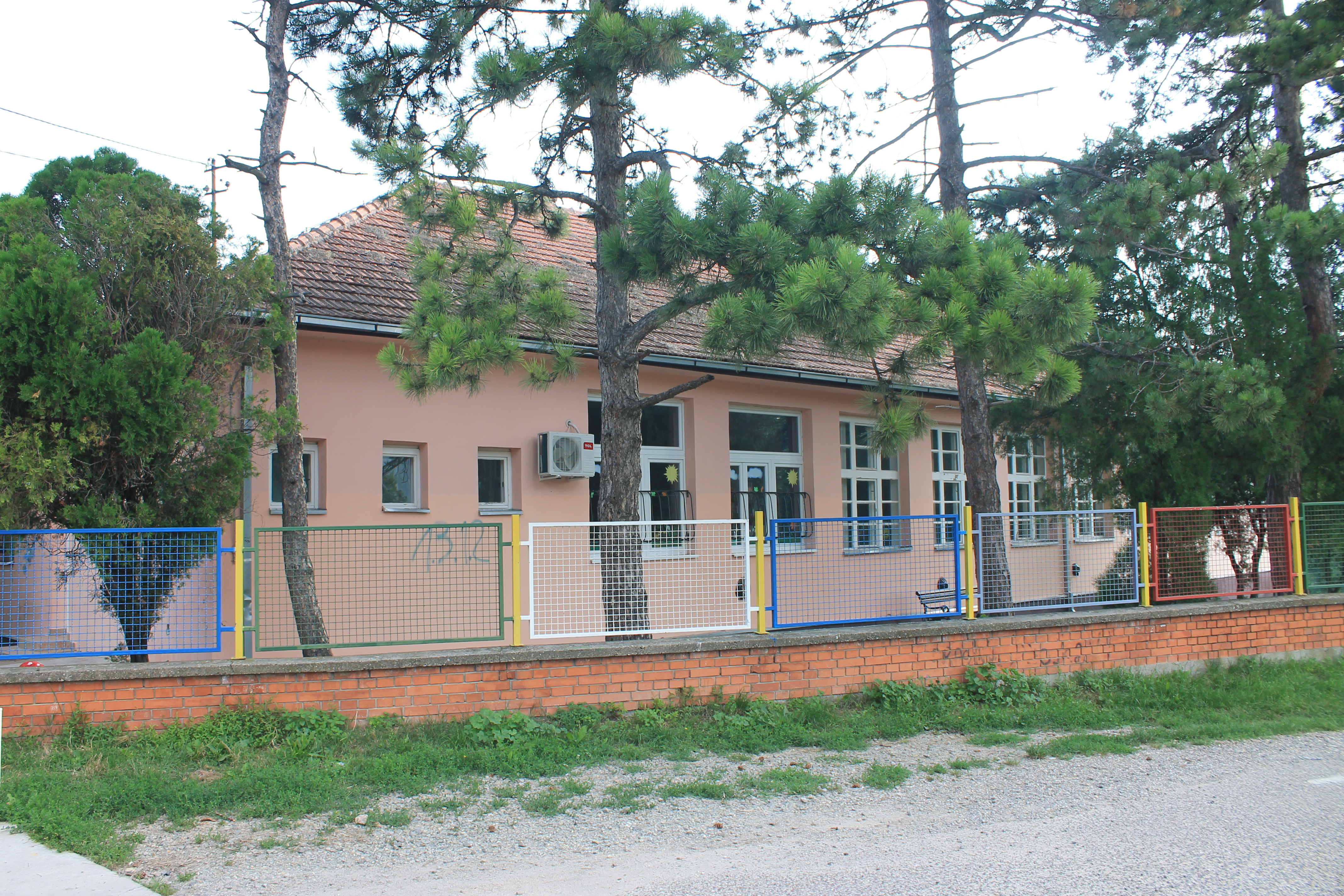 Rakovac-zgrada škole